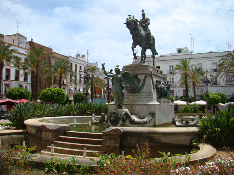 Plaza del Arenal, Jerez de la Frontera, Andalucía, España.